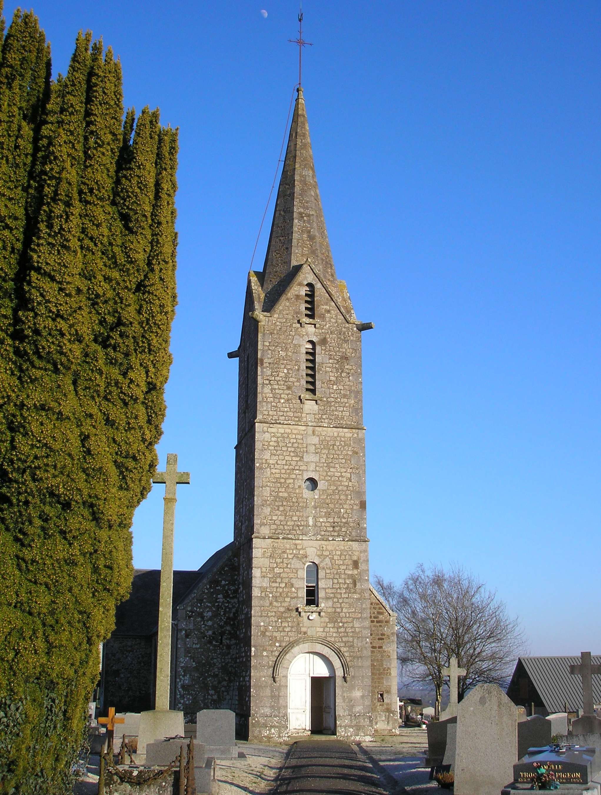 La Bazoge (Normandie, France). L'église Saint-Martin.